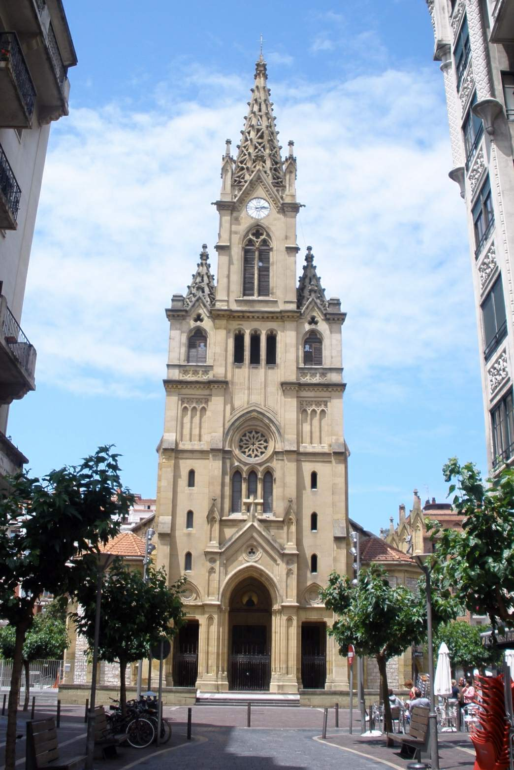 Iglesia de San Ignacio de Loyola (Donostia-San Sebastián)